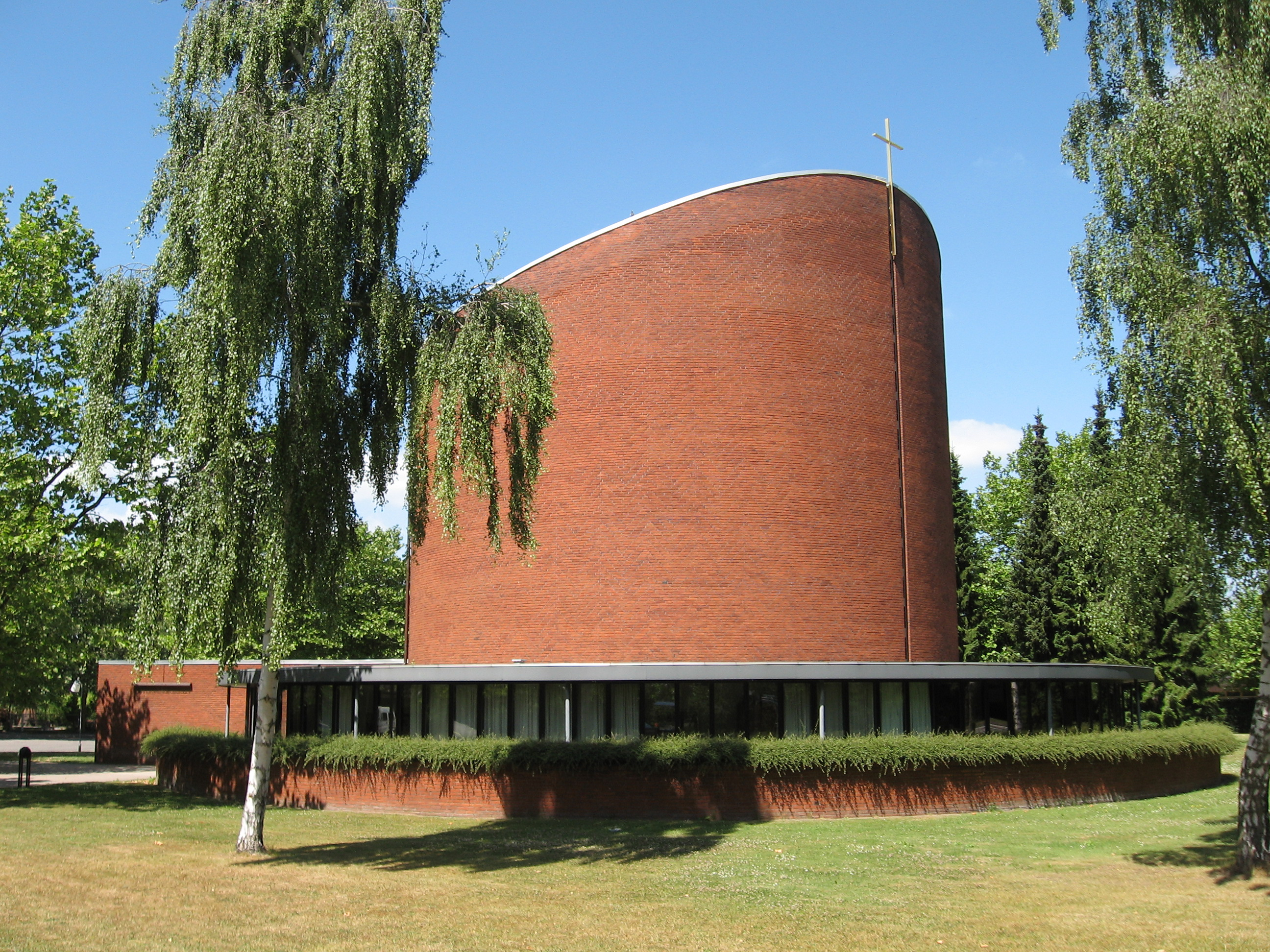 Photo of Østervangkirken, Glostrup, Denmark